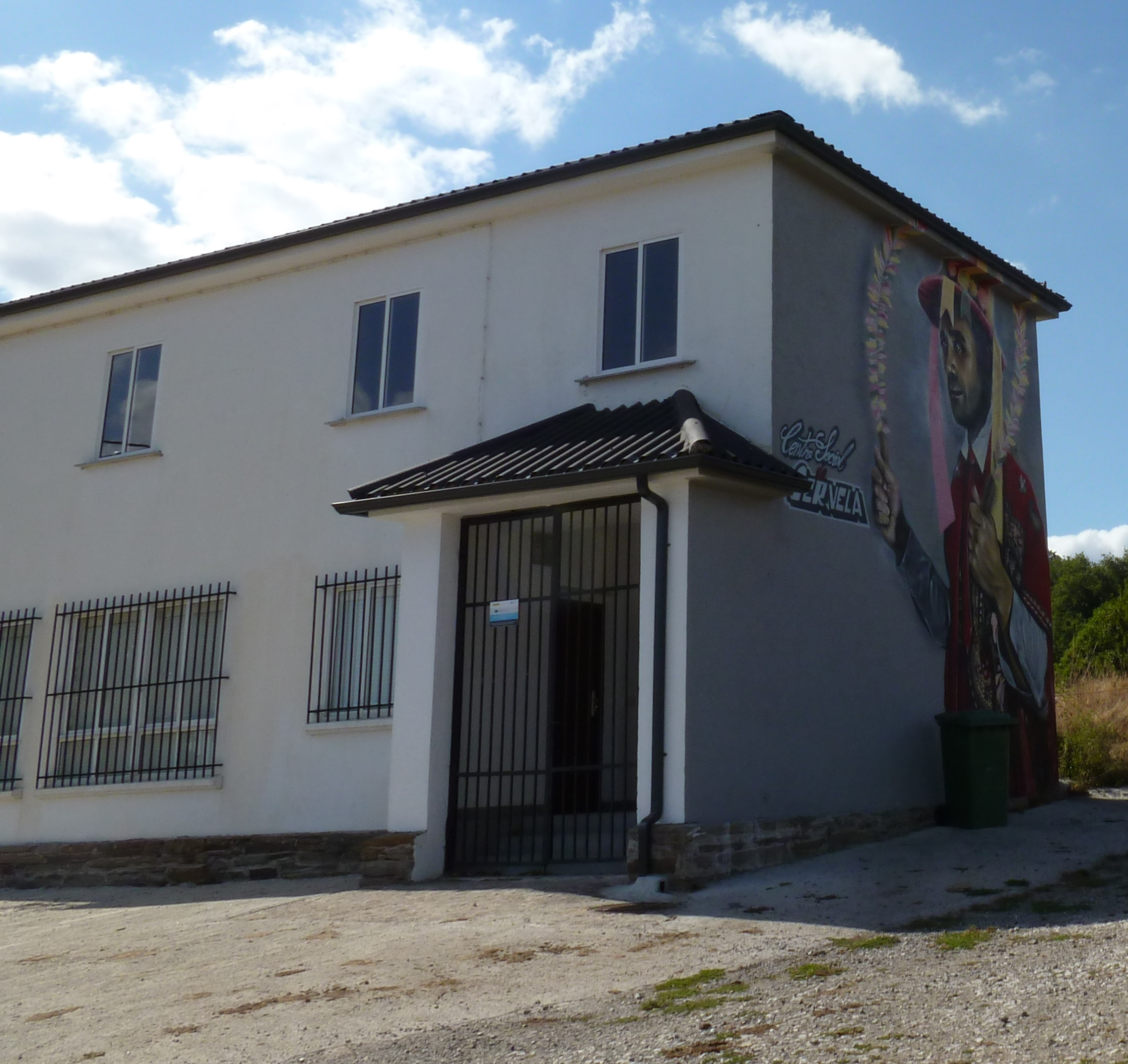 Local social na parroquia da Cervela, concello do Incio, Lugo